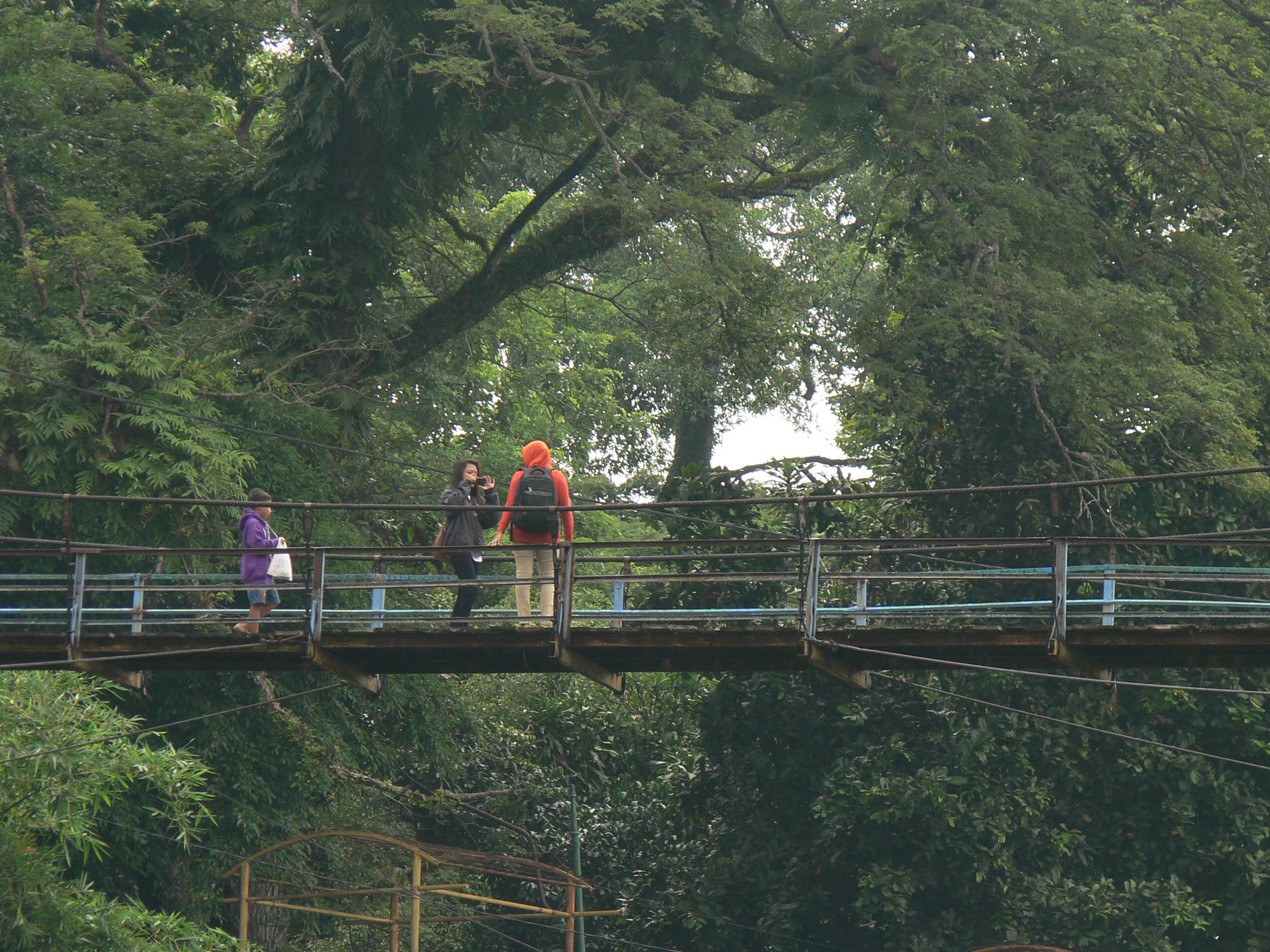 Daleman, Tulung, Klaten Regency, Central Java, Indonesia